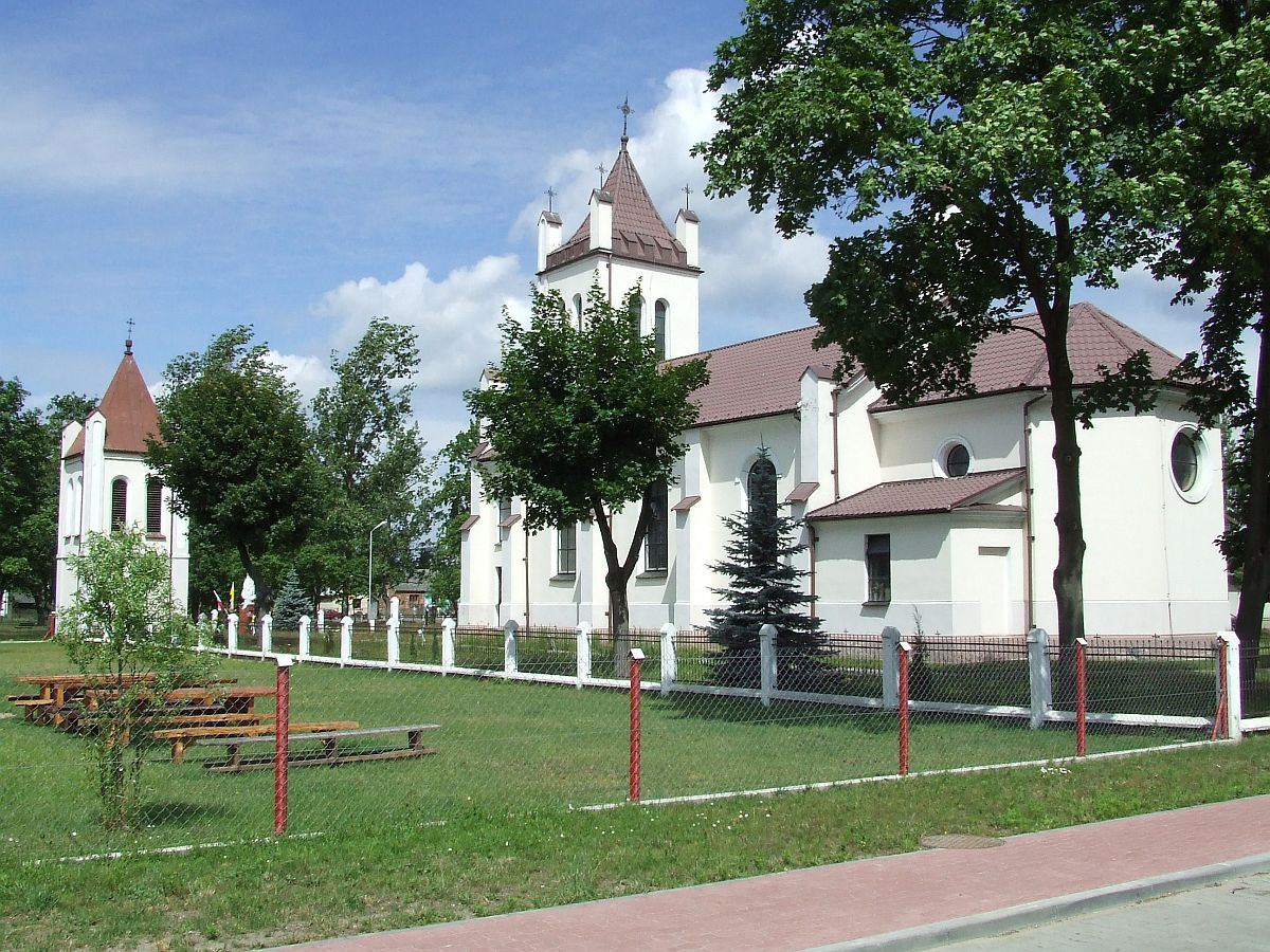 Ryczywół, ul. Warszawska 16 - kościół p.w. św. Katarzyny Aleksandryjskiej (zabytek nr rejestr. 439/A)